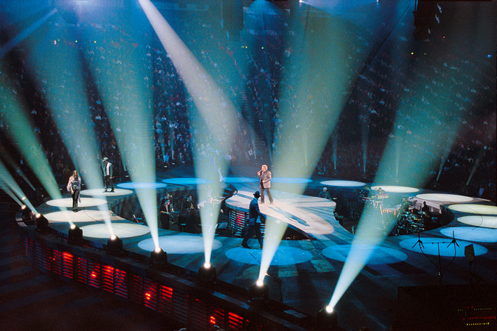 Michel Sardou à Bercy en 2001. Au moment de l'interpretation de Chanteur de Jazz